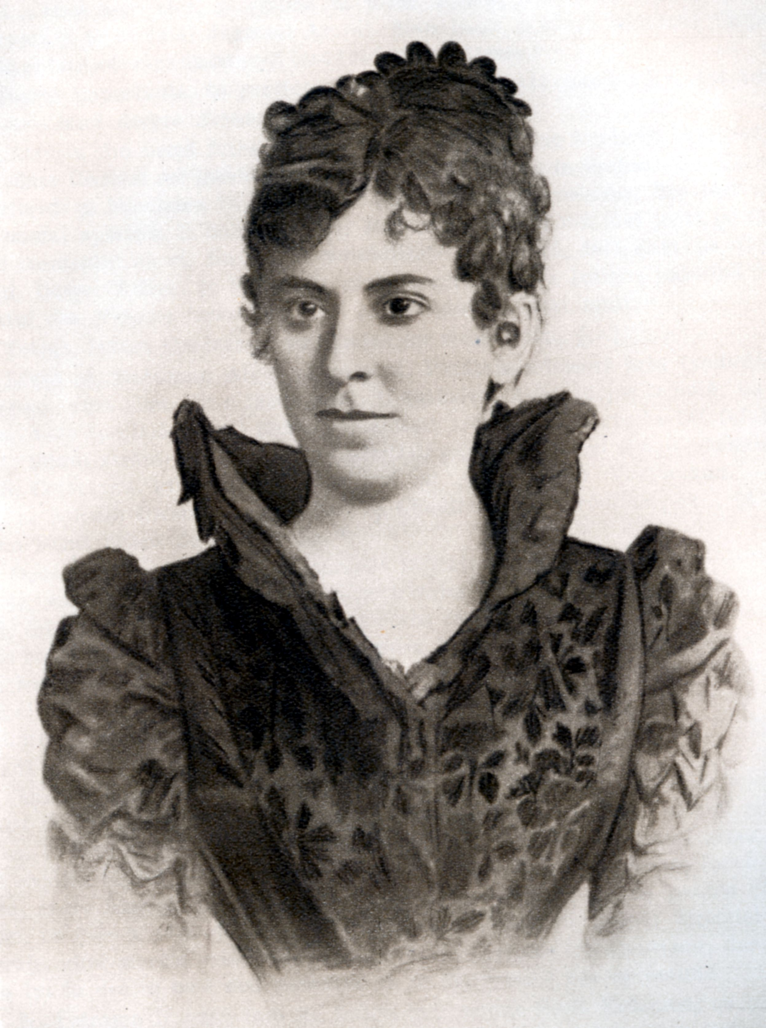 Aristizza Romanescu, Romanian actress (1854 - 1918)